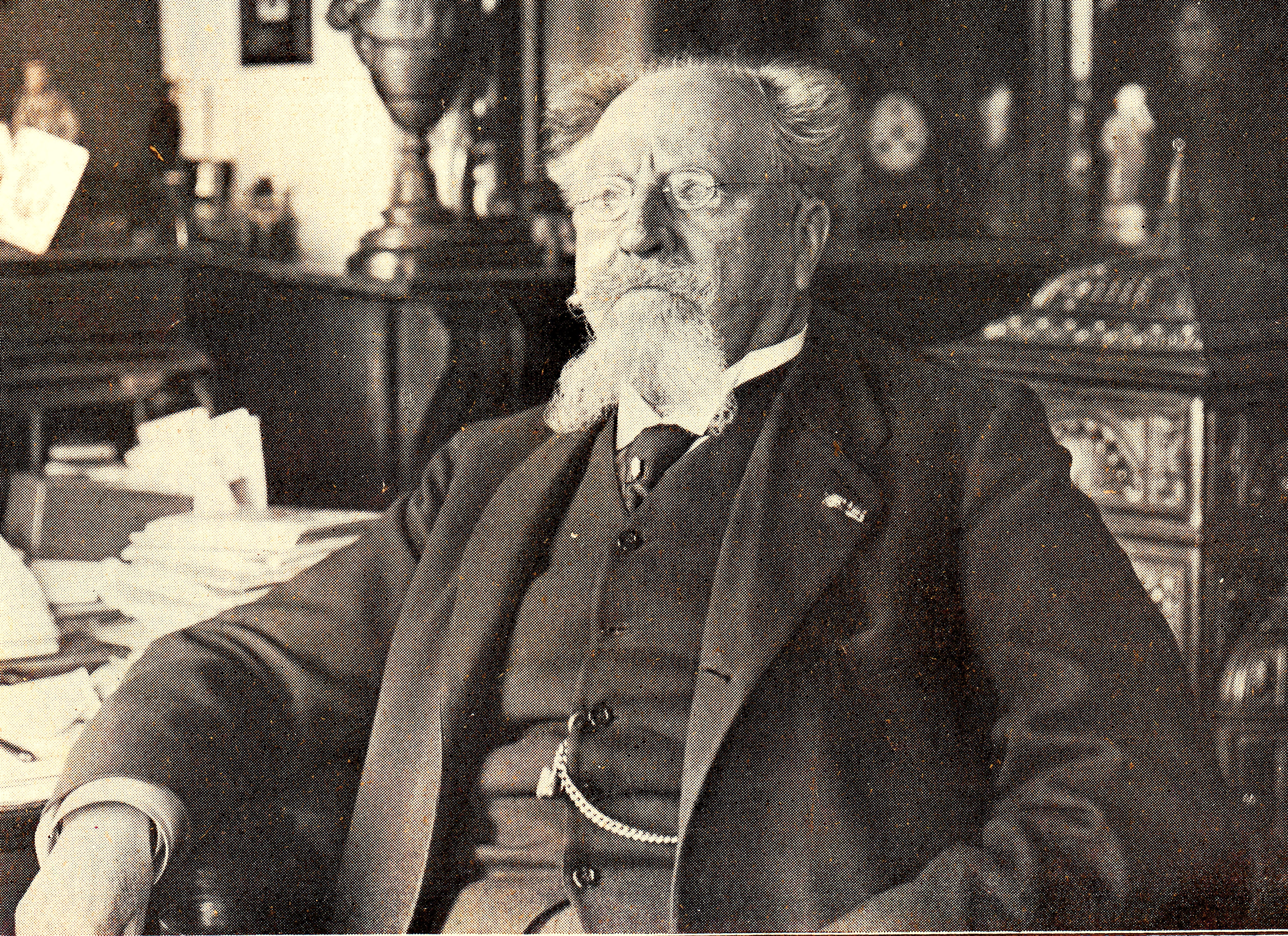 F. Lieftinck